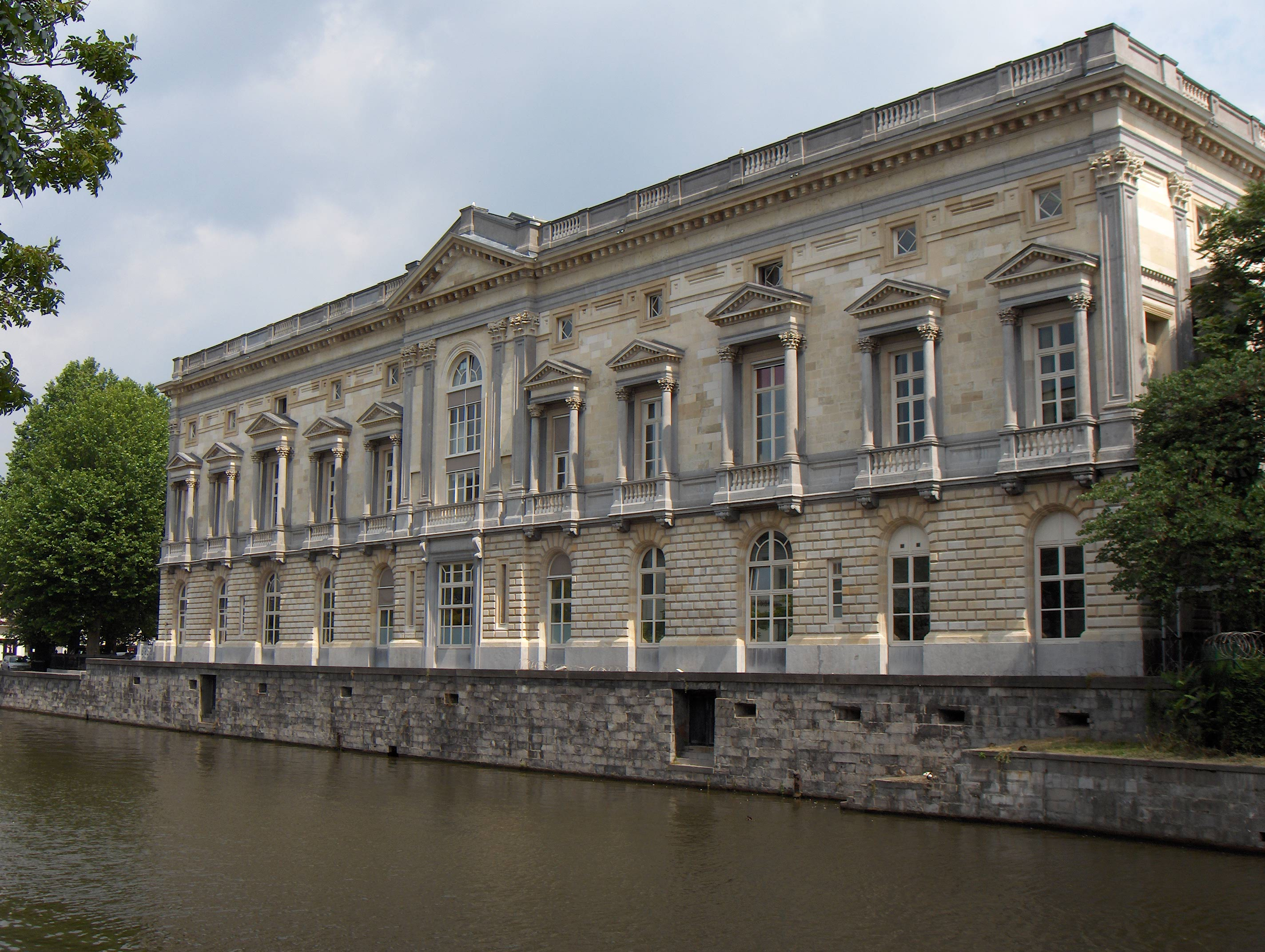 Afbeelding: Gent (België), Gerechtsgebouw, zicht vanaf de Recollettenlei. Fotograaf: Friedrich Tellberg Datum: 9 augustus 2005